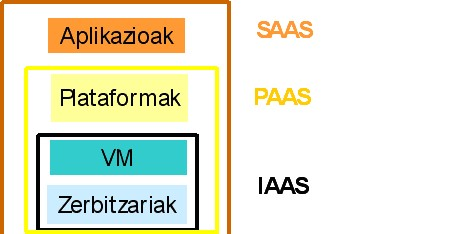 Zerbitzu motak Hodei Konputazioan